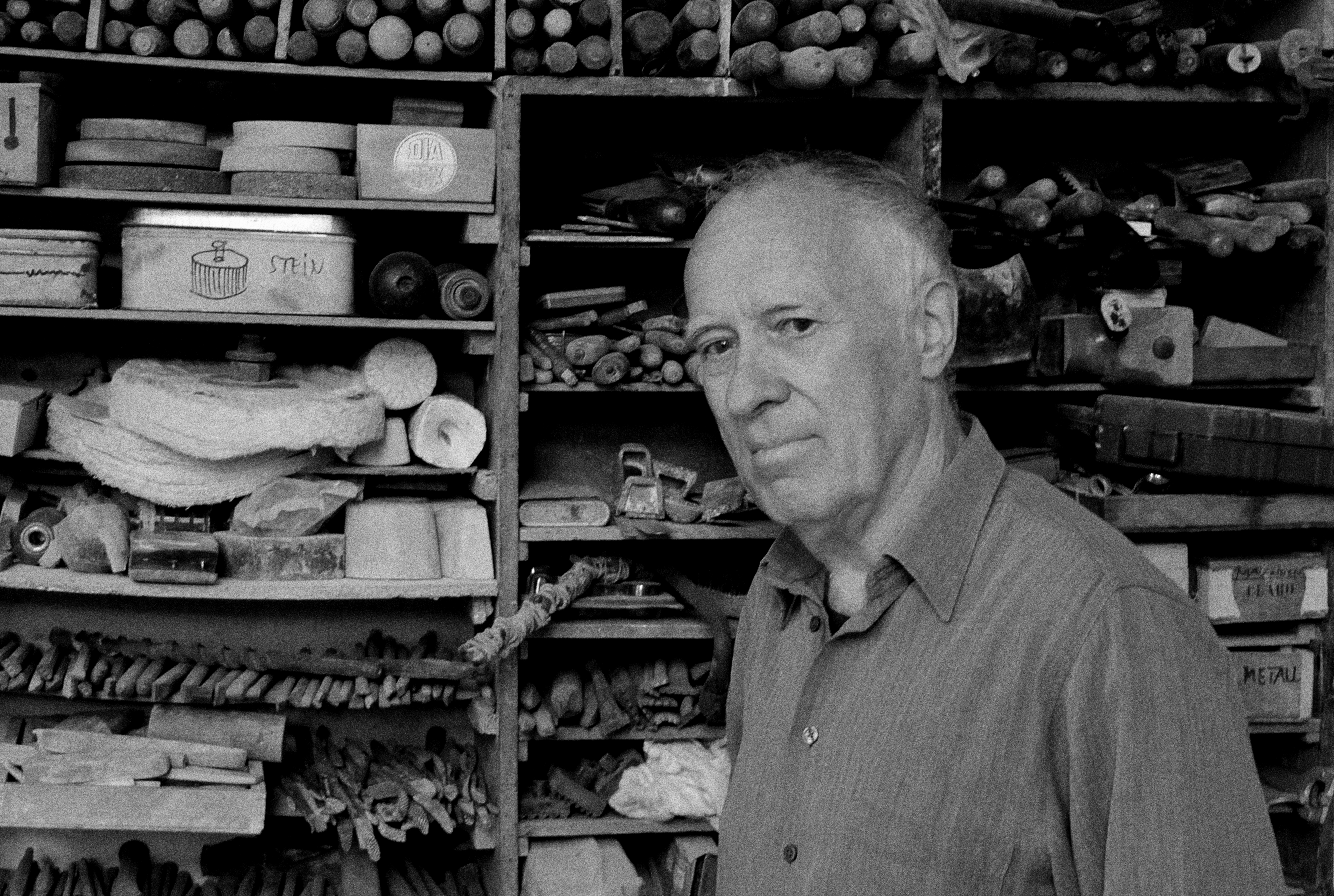 Bildhauer